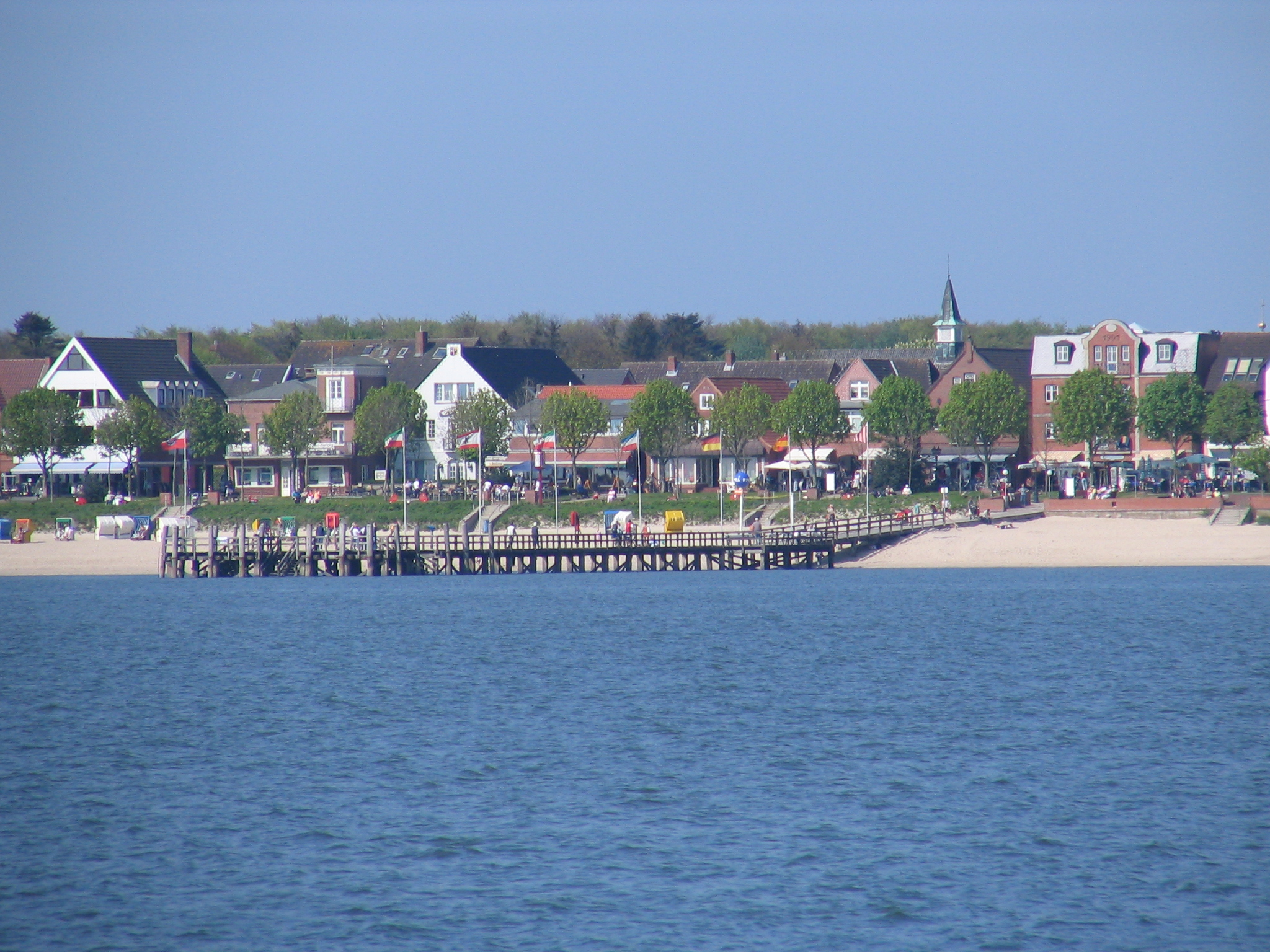 Föhr Wyk Mittelbrücke Sandwall